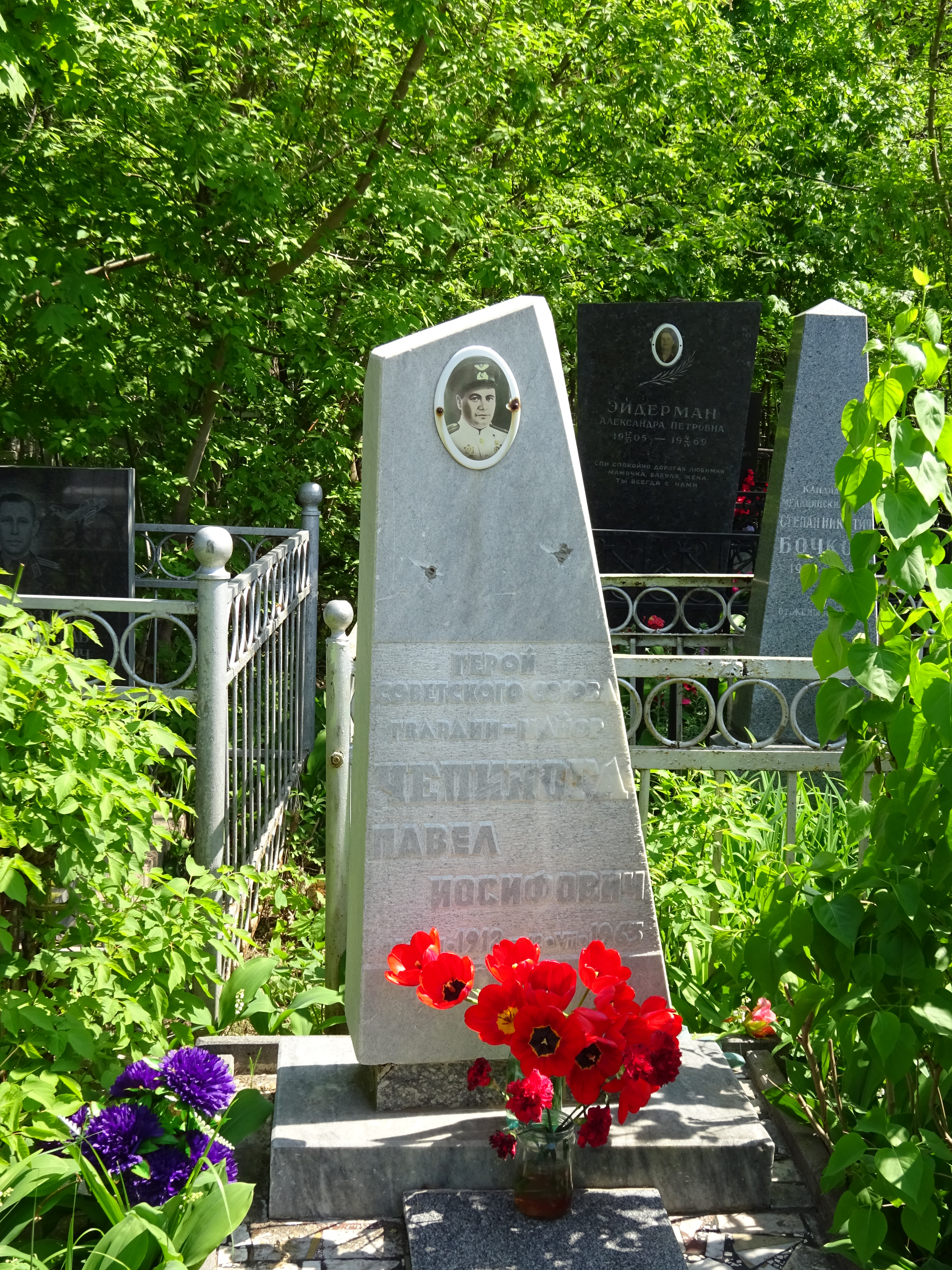 Могила Чепиноги П.И., Героя Советского союза: Воскресенское кладбище (центральная аллея, 1й участок), Саратов.